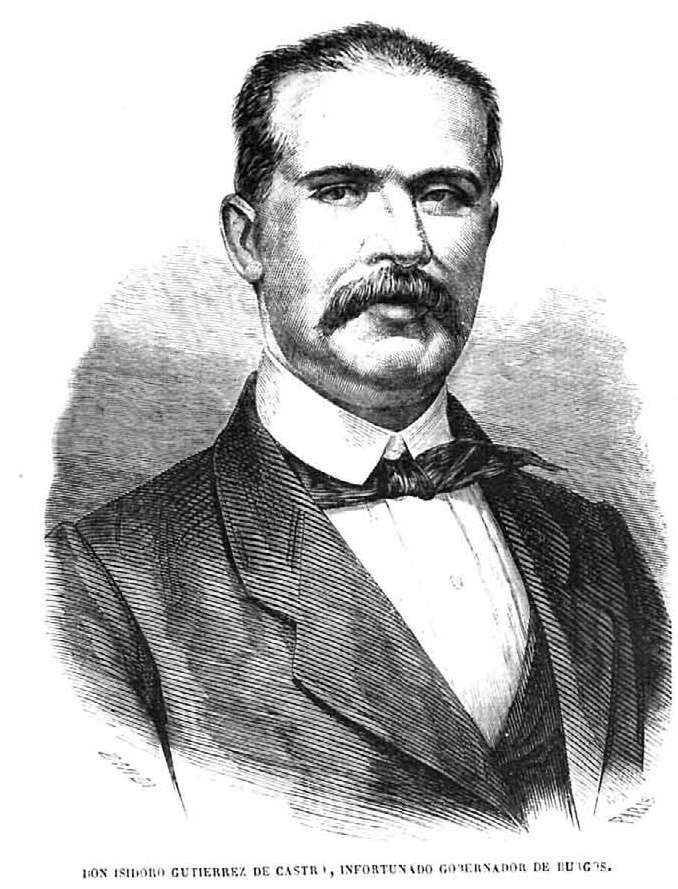 Isidoro Gutiérrez de Castro, grabado de Marcelo París publicado el 7 de febrero de 1869 en El Museo Universal